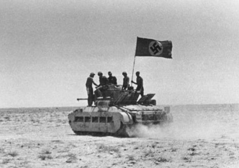 Bei den Soldaten des Deutschen Afrika-Korps Ein erbeuteter englischer Tank, von Truppen des deutschen Afrikakorps wieder flottgemacht, rollt mit wehender Fahne über eine Wüstenstrasse im Kampfgebiet von Tobruk.